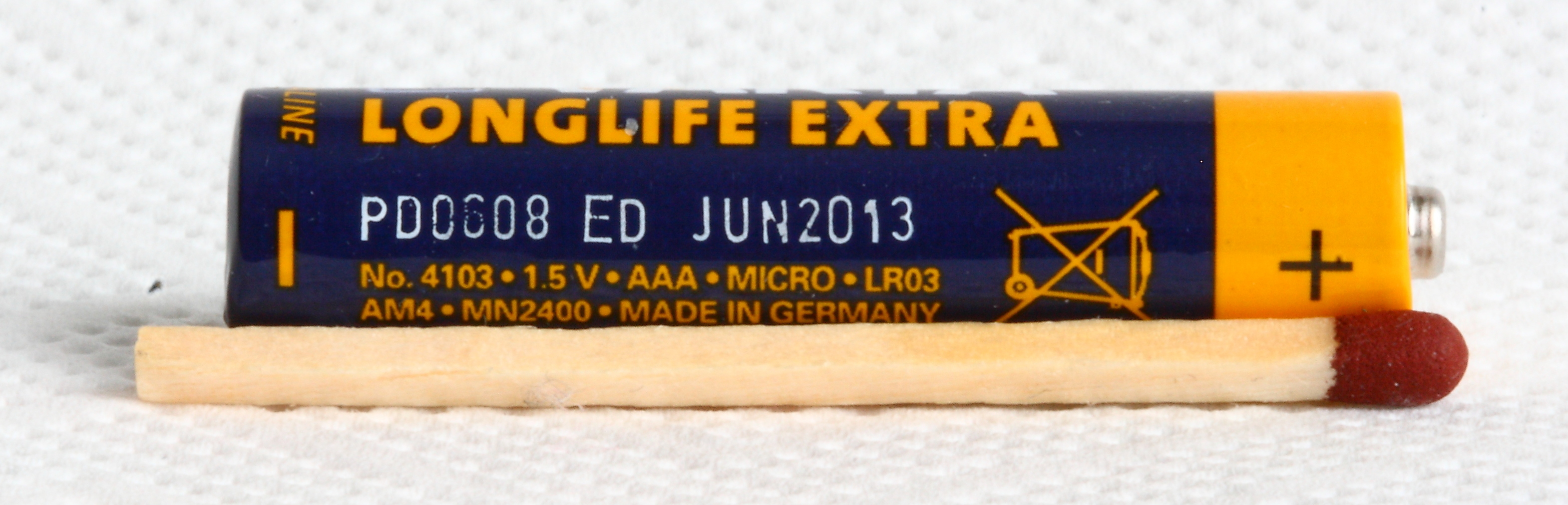 Batterie_AAA_1.5_Volt (Größenvergleich: Streichholz)